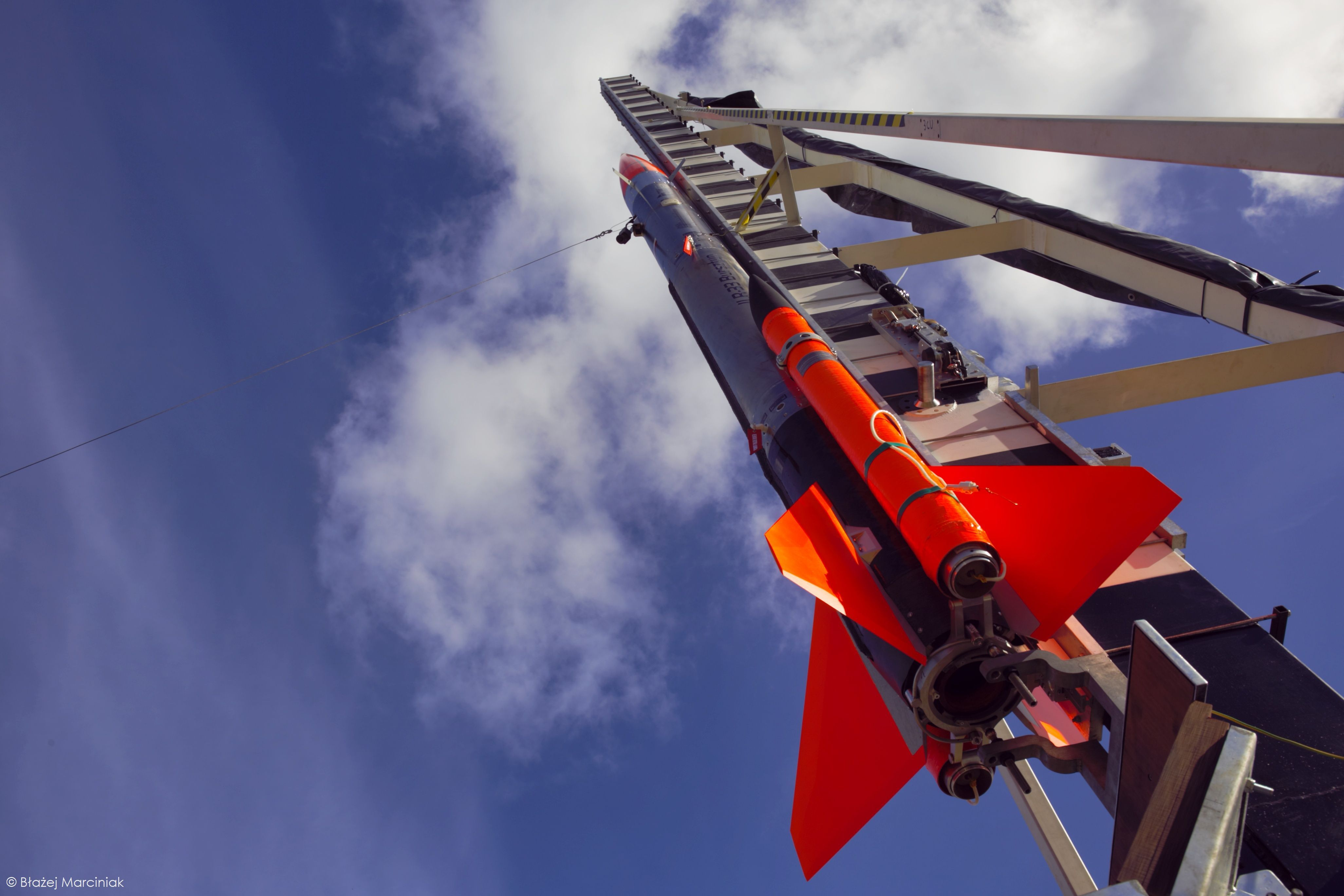 Zdjęcie przedstawia rakietę ILR-33 BURSZTYN w gotowości do startu na wyrzutni rakietowej, w czasie kampanii startowej w CPSP Ustka we wrześniu 2018 roku.